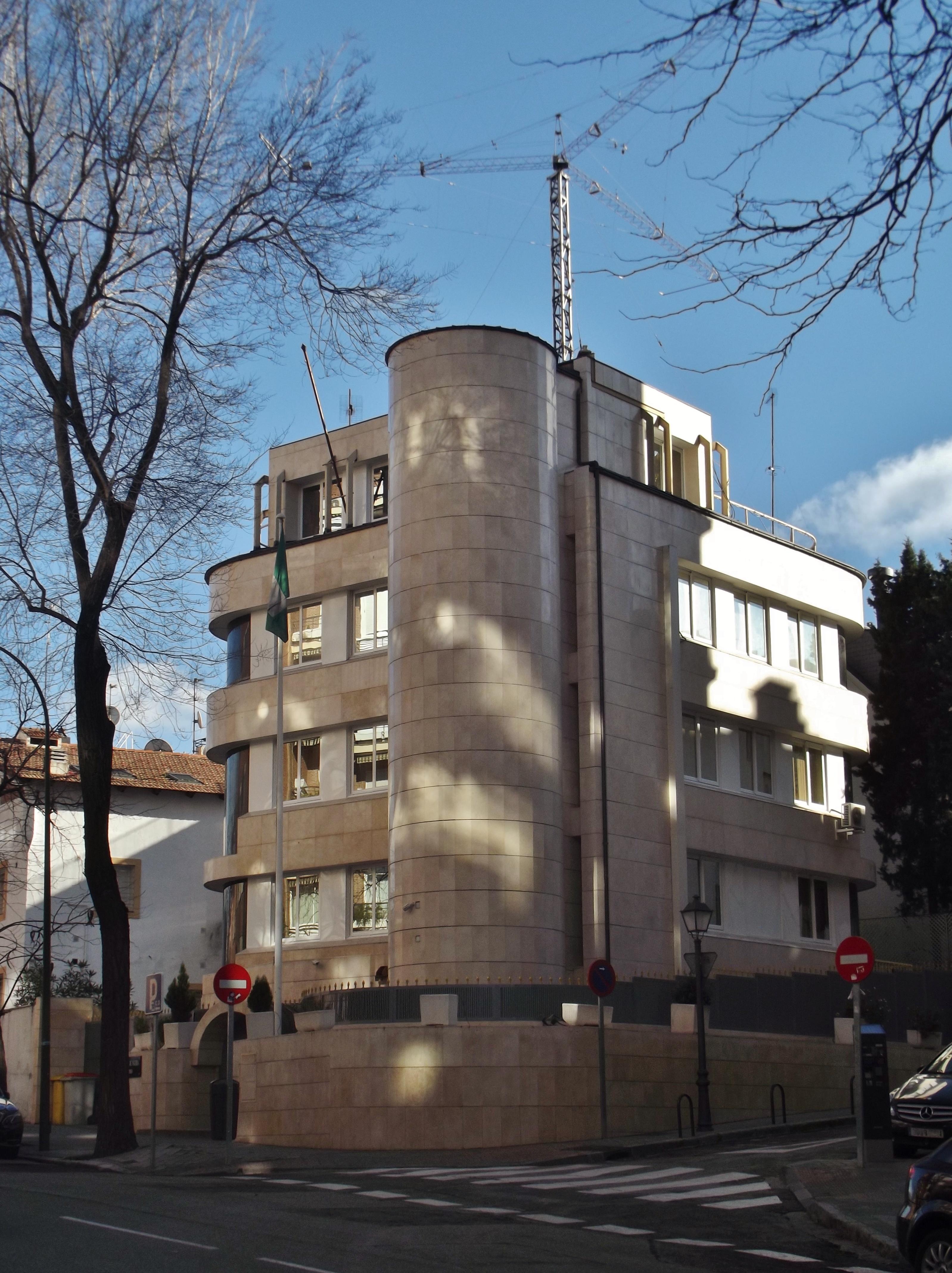 Embajada de Nigeria. This is a retouched picture, which means that it has been digitally altered from its original version. Modifications: Distorted car plates.